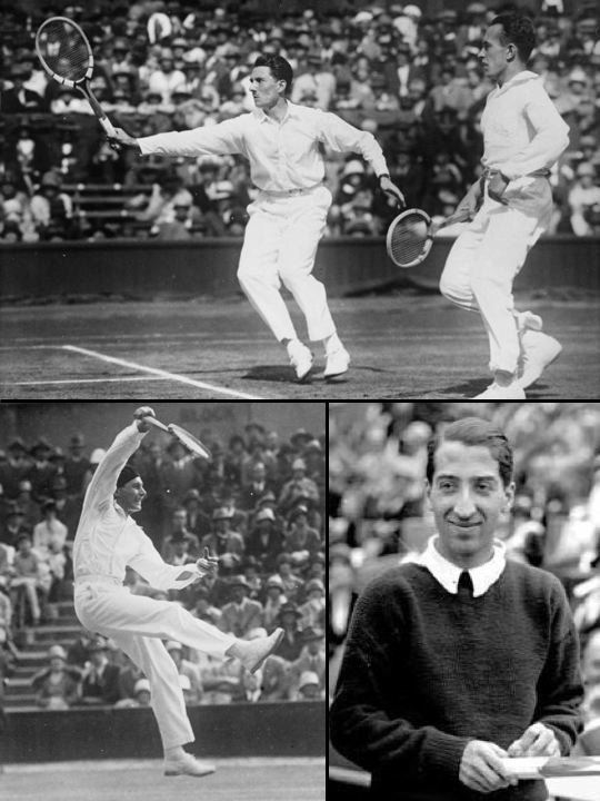 Title: Wimbledon, Tennisturnier Factual corrections and alternative descriptions are encouraged separately from the original description. Additionally errors can be reported at this page to inform the Bundesarchiv. Original historic description: Frankreichs Verteidigung des Davis-Pokals ! Eine Wimbledon-Aufnahme der französischen Vertreter Brudnon (links) und Cochet (rechts). Brudnon in erhöhter Aktion beim Kampf gegen Amerikaner Tilden-Lott. Title: Berlin, Tennismatch Deutschland-Frankreich People in the image: Froitzheim, Otto: Tennisspieler, Polizeipräsident von Wiesbaden, Deutschland * Lacoste, René: Tennisspieler, Frankreich Factual corrections and alternative descriptions are encouraged separately from the original description. Additionally errors can be reported at this page to inform the Bundesarchiv. Original historic description: Das grosse Tennismatch Deutschland-Frankreich fand vor 6000 Zuschauern im Blau-weiss-Tennis-Stadion in Berlin-Dahlem statt. Sieger wurde der Weltmeister Lacoste über den deutschen Alt-Tennismeister Froitzheim. Title: Jean Borotra People in the image: Borotra, Jean: Tennisspieler, Frankreich Factual corrections and alternative descriptions are encouraged separately from the original description. Additionally errors can be reported at this page to inform the Bundesarchiv. Original historic description: Der "fliegende Baske" kommt nach Berlin! Jean Borotra, der berühmte französische Tennismeister, auch "der fliegende Baske" genannnt, wird am 10. und 11. Januar in der neuen Tennishalle in Berlin dem Publikum sein grosses Können zeigen.